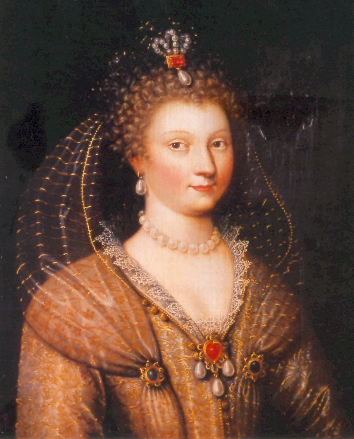 Louise de Clermont, comtesse de Tonnerre (1504 † 1596), collection ducale d'Uzès